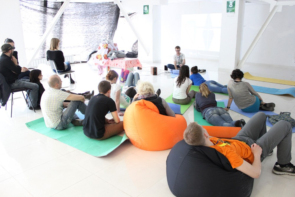 Вот в такой ненапряжной атмосфере проходит образовательная программа фестиваля. Василий Филатов рассказывает о саунд-дизайне в интерактивных проектах.